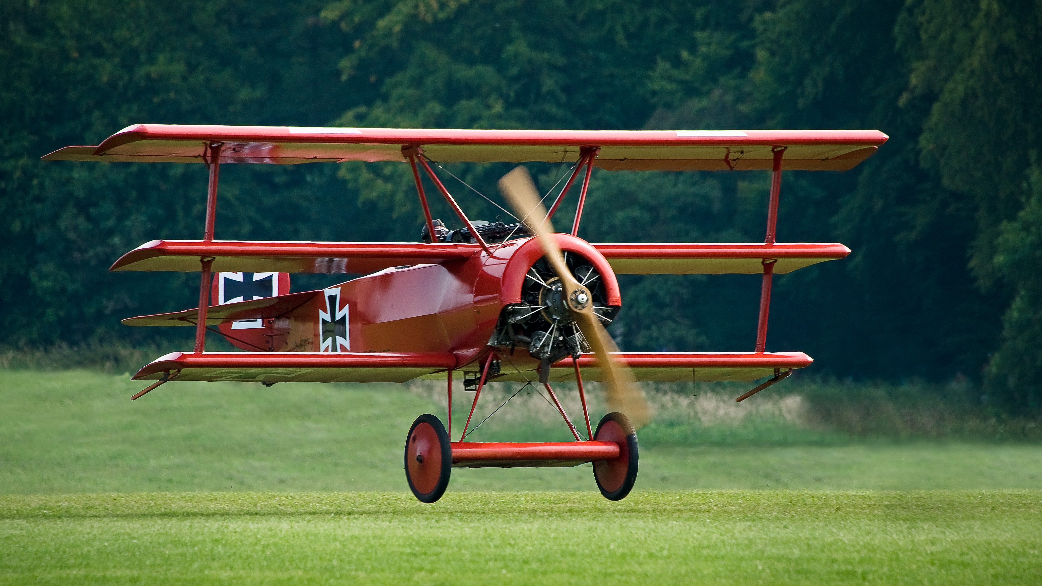 Dieses Foto wurde beim Oldtimer Fliegertreffen, 2013 am Flugfeld Hahnweide bei Kirchheim unter Teck aufgenommen. Es zeigt eine Fokker DR.1 Replika bei der Landung